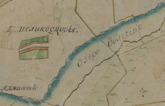 Озеро Валдеево на планах Генерального межевания XVIII века